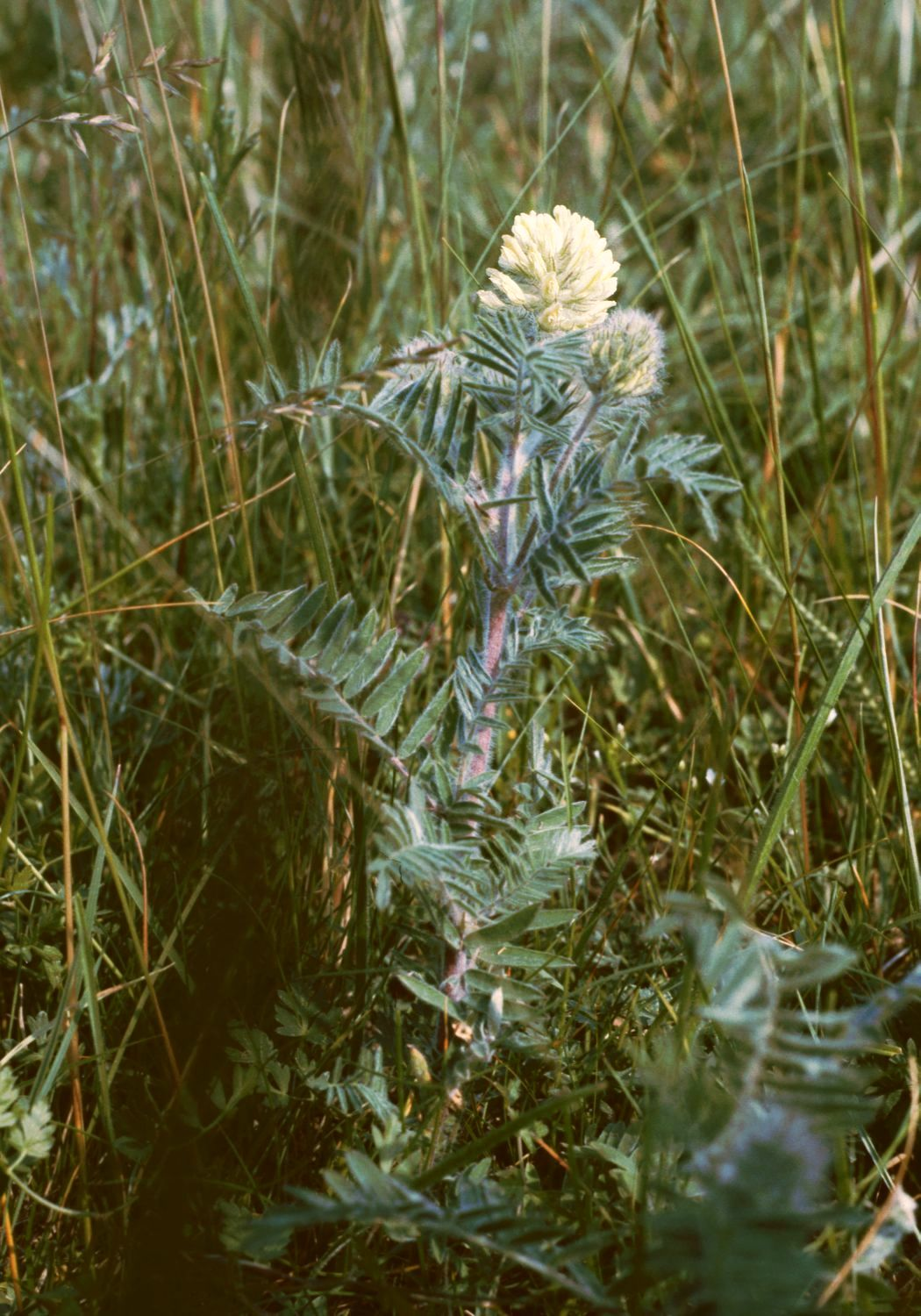 Steppen-Spitzkiel (Oxytropis pilosa (L.) DC.), Hülsenfrüchtler (Fabaceae), Schmetterlingsblütler (Faboideae) - Österreich/Austria/Autriche: Niederösterreich, Marchfeld, bei Oberweiden